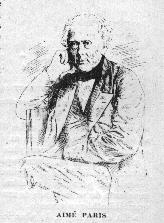 Paris, Aime Gravure d'Aimé Paris, dans le domaine public vu l'âge de ce dernier (décédé en 1866).